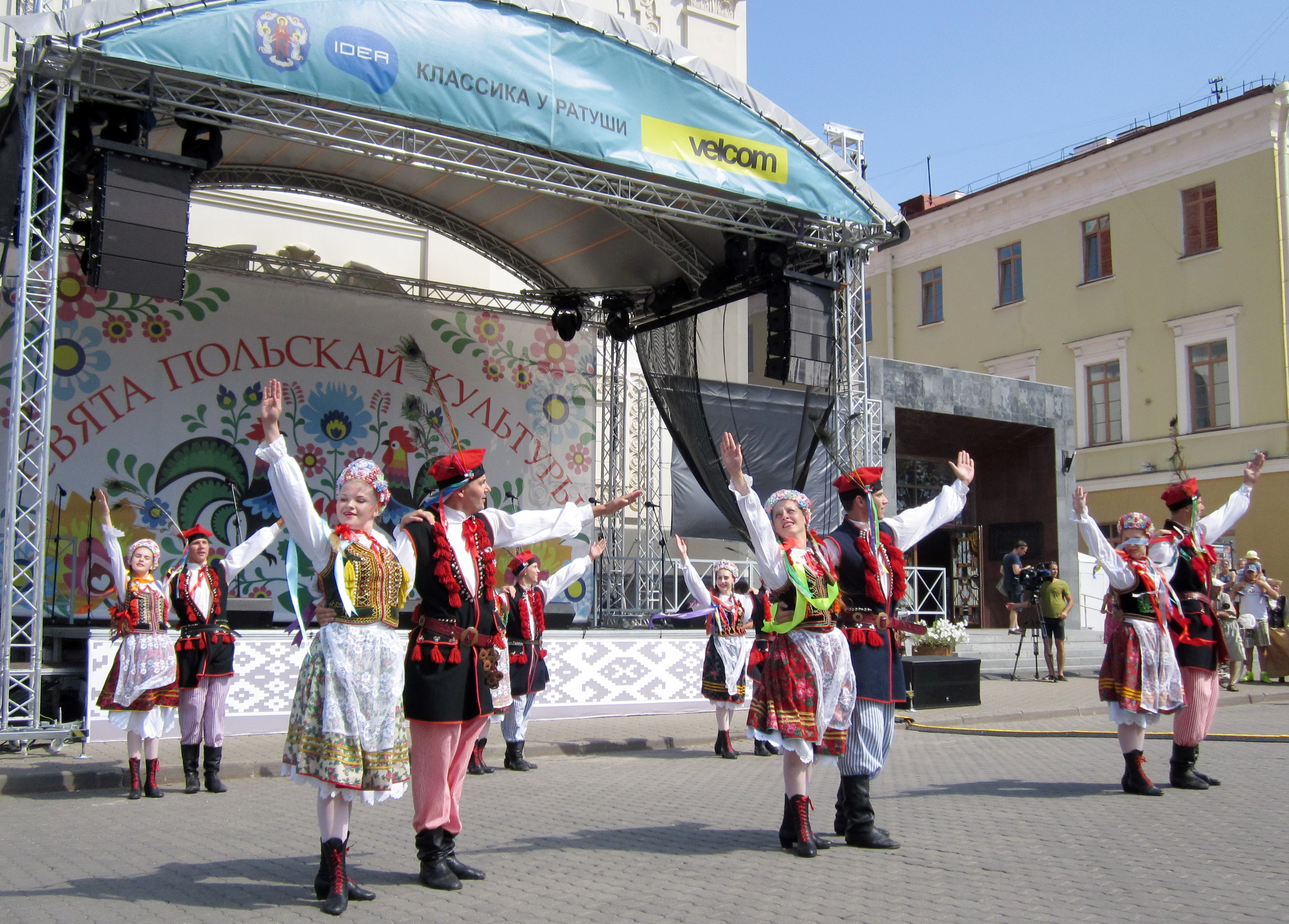 Młodzieżowy zespół tańca Domu polskiego z Lidy "Kresowe Zabawy". Pierwsze Święto polskiej kultury w Mińsku